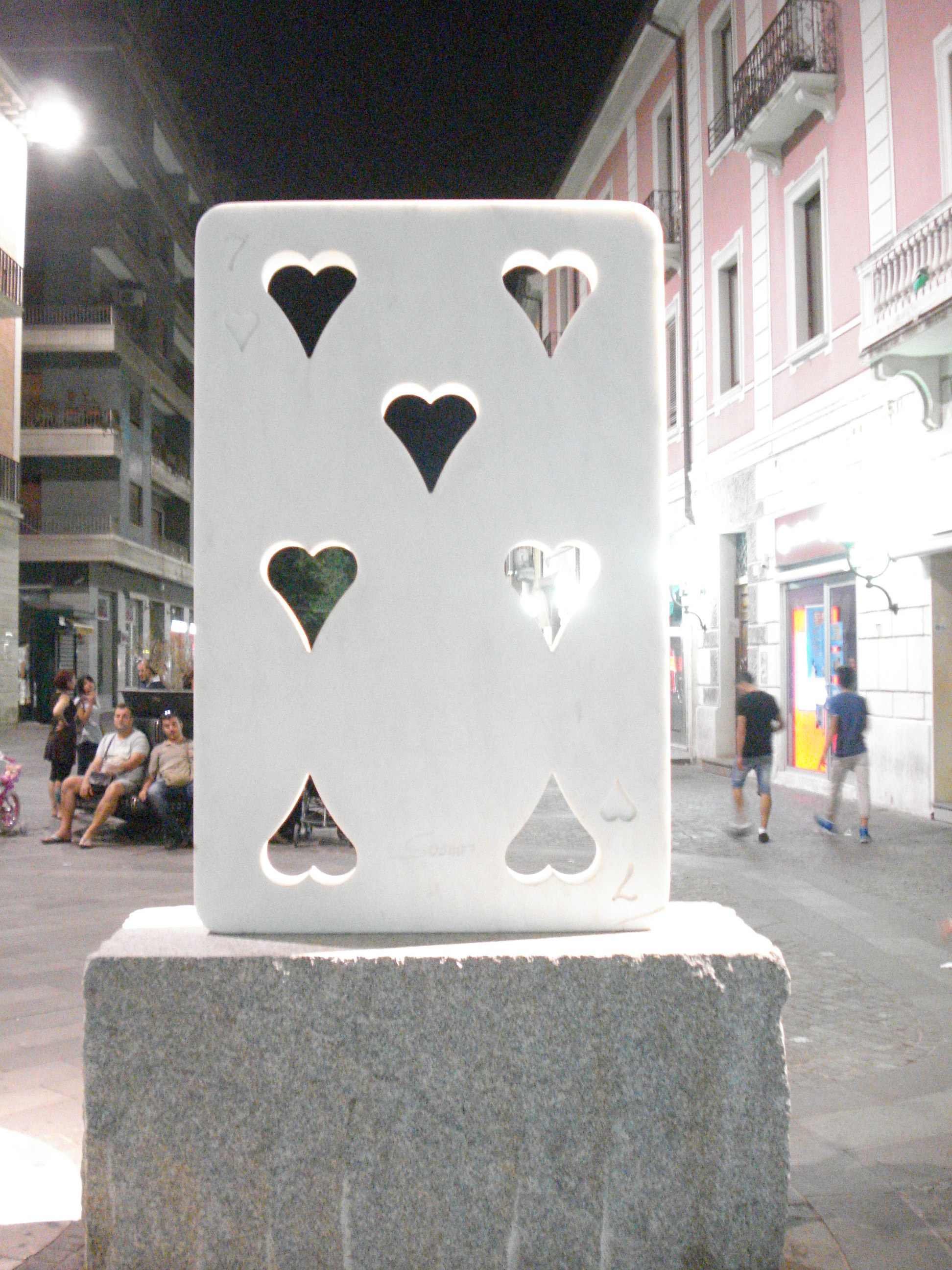 Sette di cuori di Sacha Sosno del Museo all'aperto Bilotti sull'isola pedonale di Corso Mazzini a Cosenza